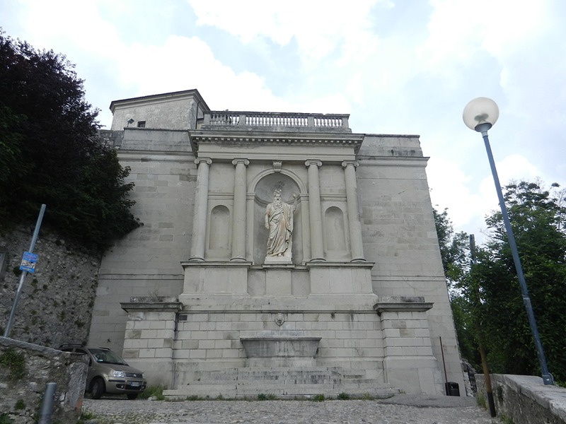 Sacro Monte di Varese - Statua di Mosè al termine della salita